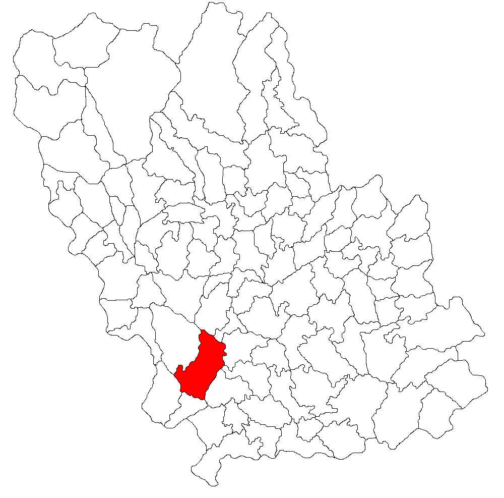 Categorie:Hărţi ale judeţului Prahova